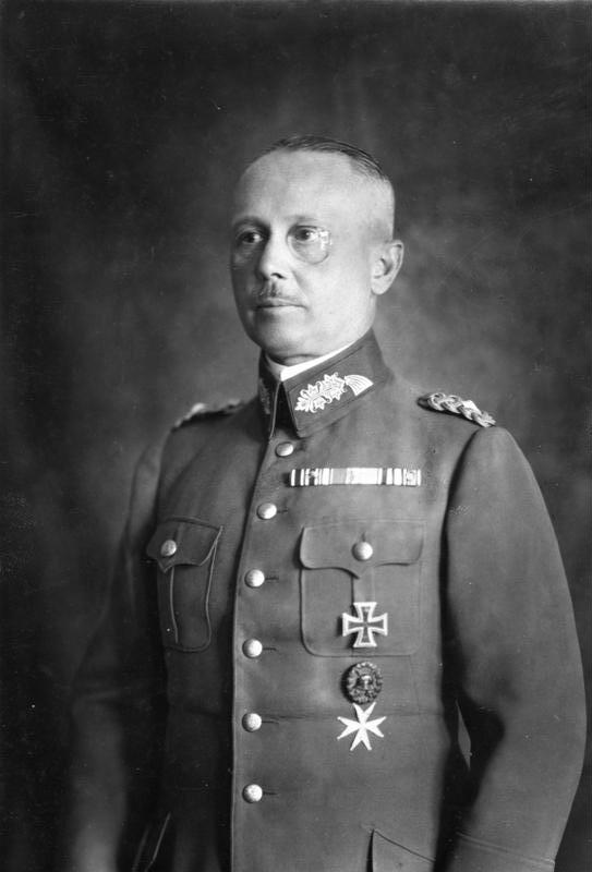 Werner von Fritsch Scherl Bilderdienst Generalleutnant [Werner] Freiherr von Fritsch 27391-32 Abgebildete Personen: Fritsch, Werner von Freiherr: Generaloberst, Oberbefehlshaber des Heeres, Deutschland